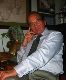 Vittorio Russo